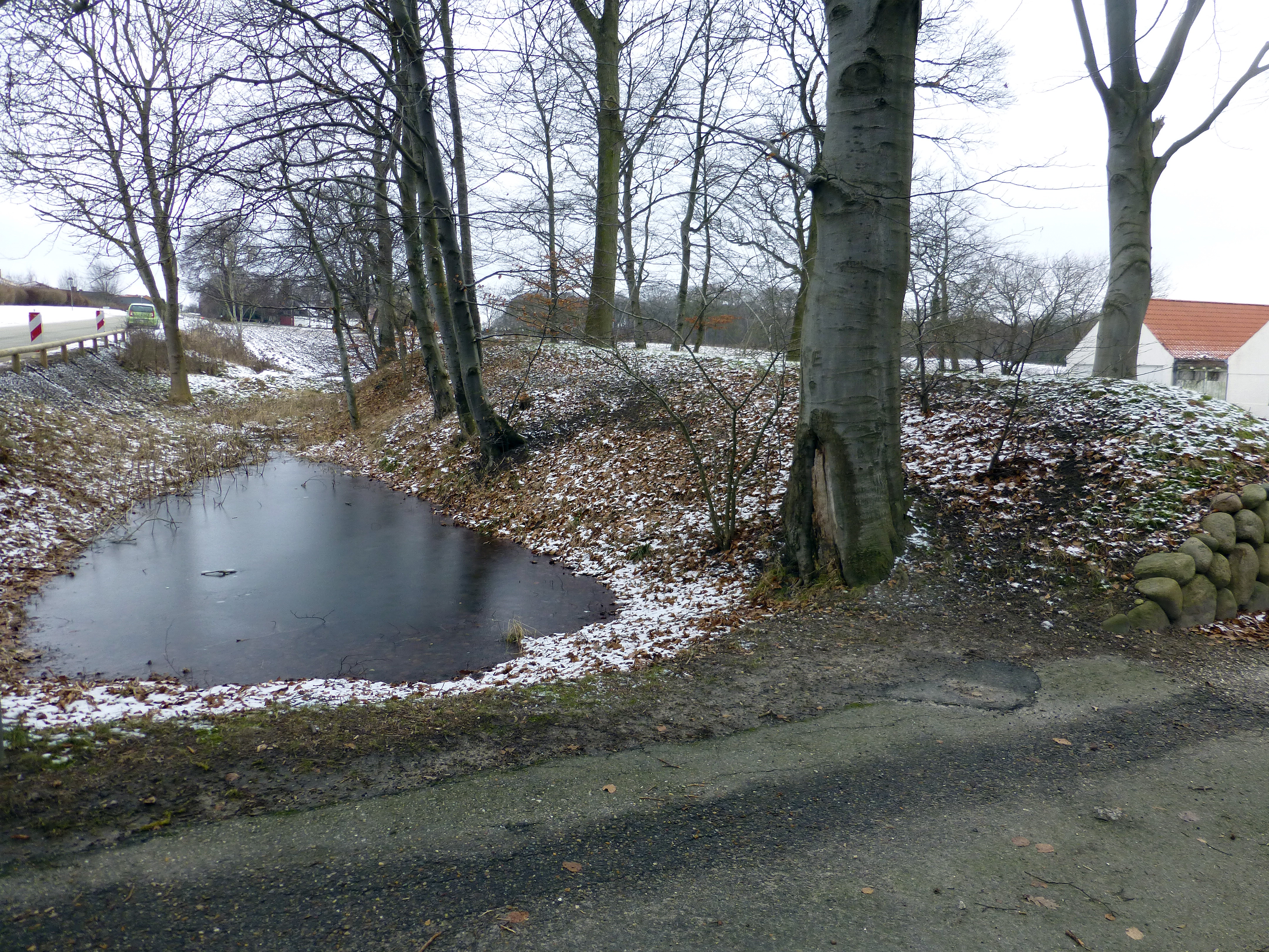 Bådstedgård eller Bodstedgaard er et middelalderligt voldsted beliggende i Stautrup i Kolt Sogn, Aarhus Kommune. Sydvolden set mod vest